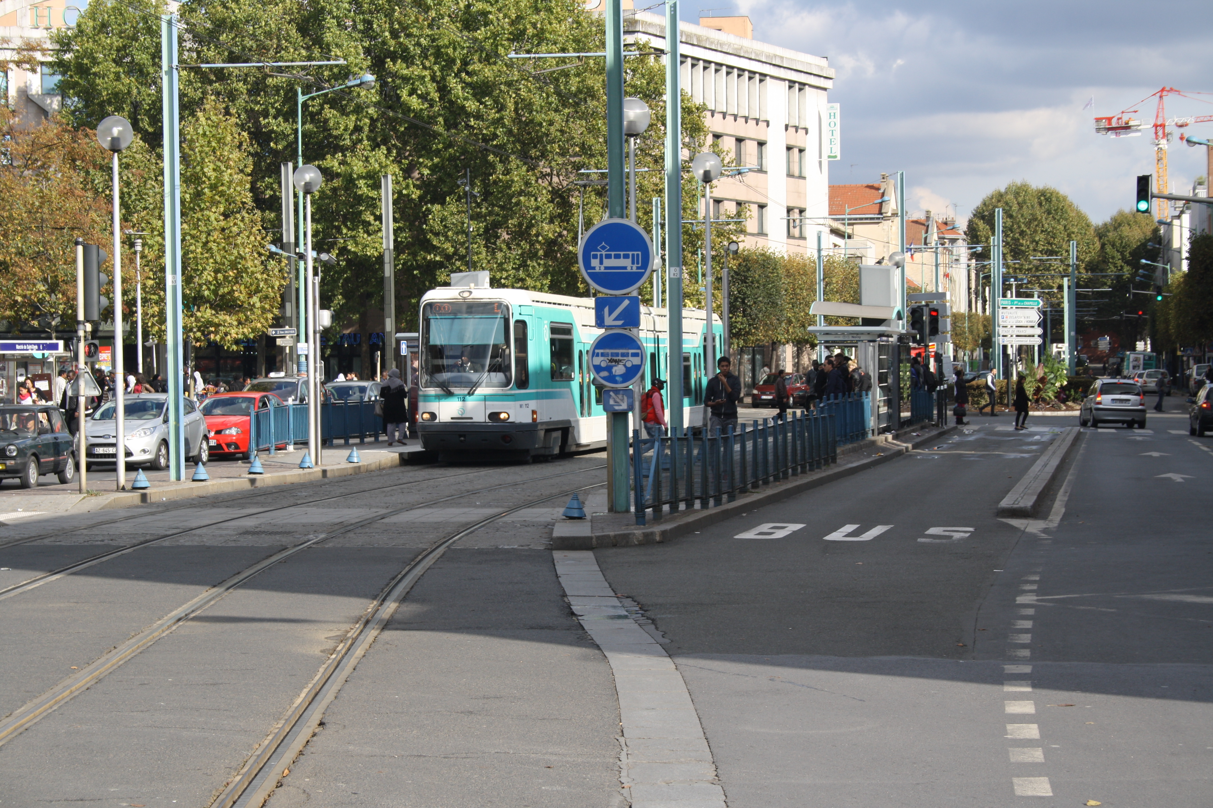 Tram T1 Haltestelle Marché de Saint-Denis